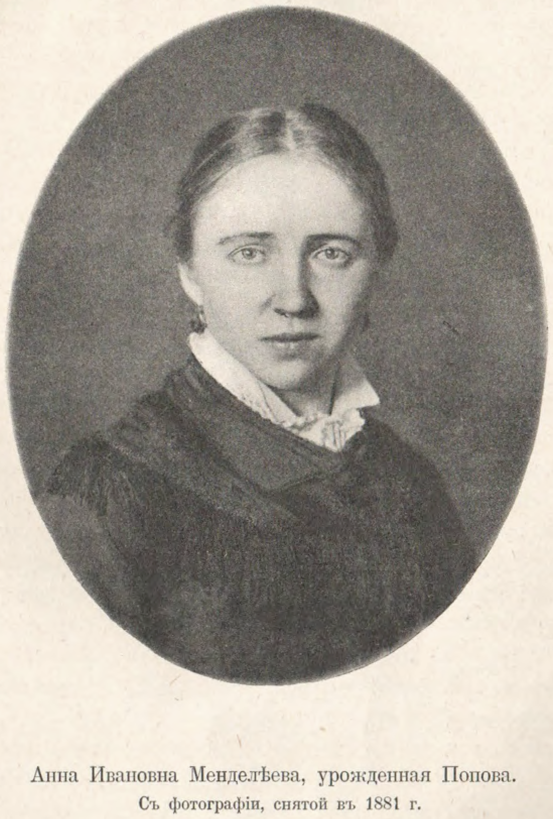 Анна Ивановна Менделеева, урождённая Попова (1860—1942), вторая жена Д. И. Менделеева